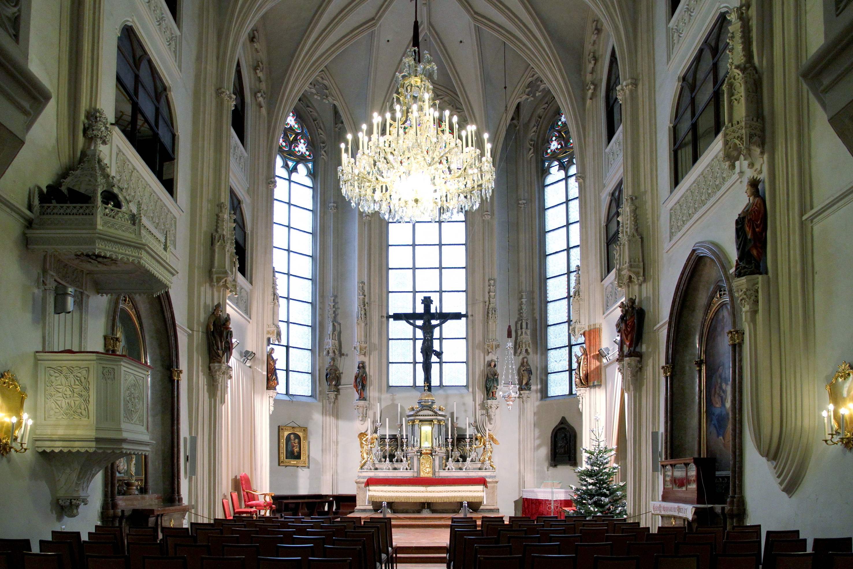 Die Wiener Hofburgkapelle ist die älteste und Hauptkapelle der Hofburg sowie Hauskapelle der Habsburger. Vermutlich um 1287/88 ließ Albrecht I. eine spätromanische Kapelle errichten, die urkundlich 1296 erstmals erwähnt wurde. Von 1423 bis 1426 erfolgte unter Albrecht V. eine Erweiterung. Von 1447 bis 1449 ließ Kaiser Friedrich III. sie im gotischen Stil um- und ausbauen. Maria Theresia veranlasste einen spätbarocken Umbau der Kapelle. Im Zuge des Klassizismus wurde sie 1802 wiederum regotisiert. In ihr konzertierte die von Maximilian I. gegründete Hofmusikkapelle, deren Tradition von den Wienern Philharmonikern und den Wiener Sängerknaben fortgeführt wird.